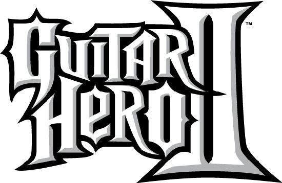 Logotipo oficial del videojuego Guitar Hero II.